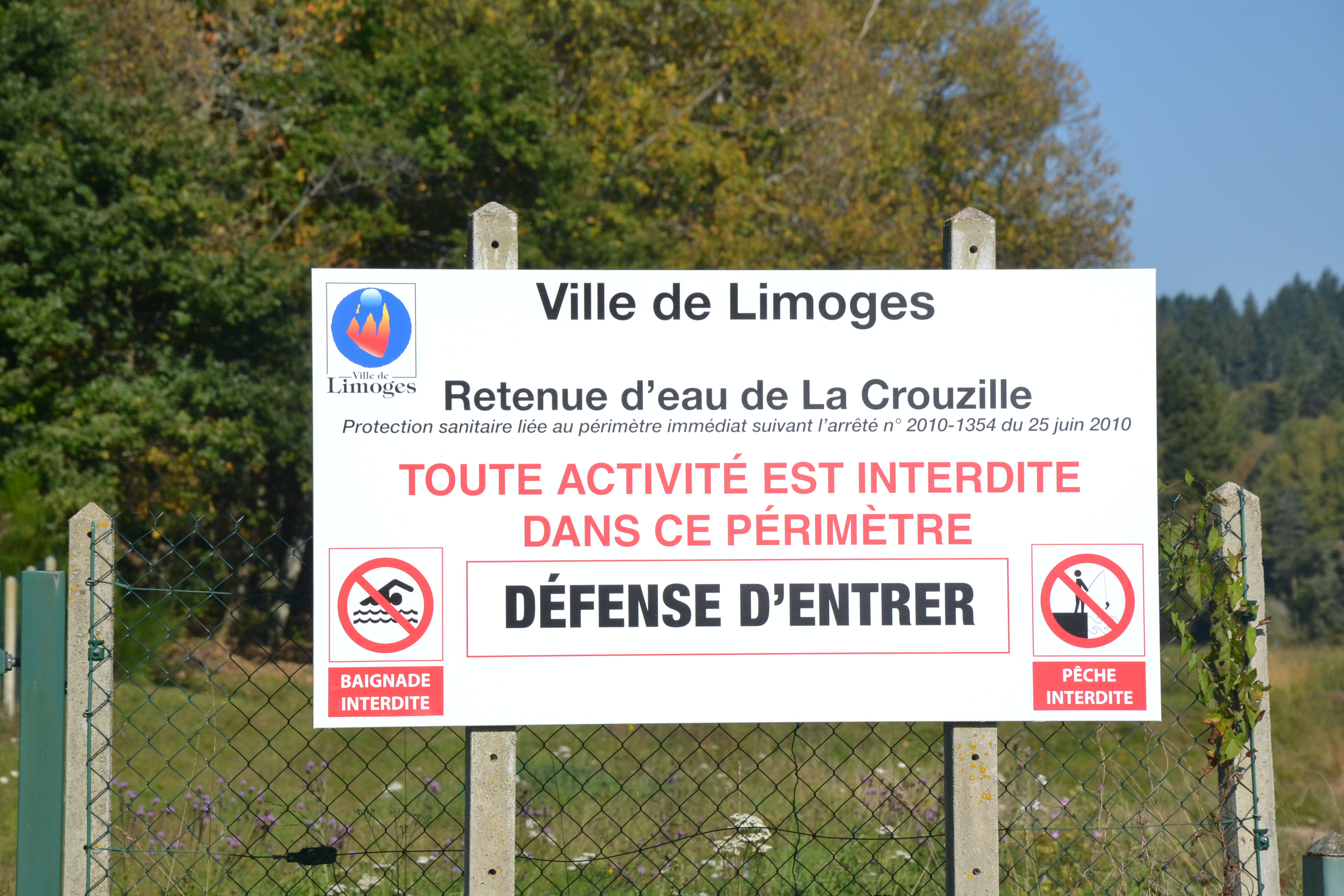 Etang de la Crouzille, réserve d'eau de la Ville de Limoges (commune de Saint-Sylvestre, Haute-Vienne, France).